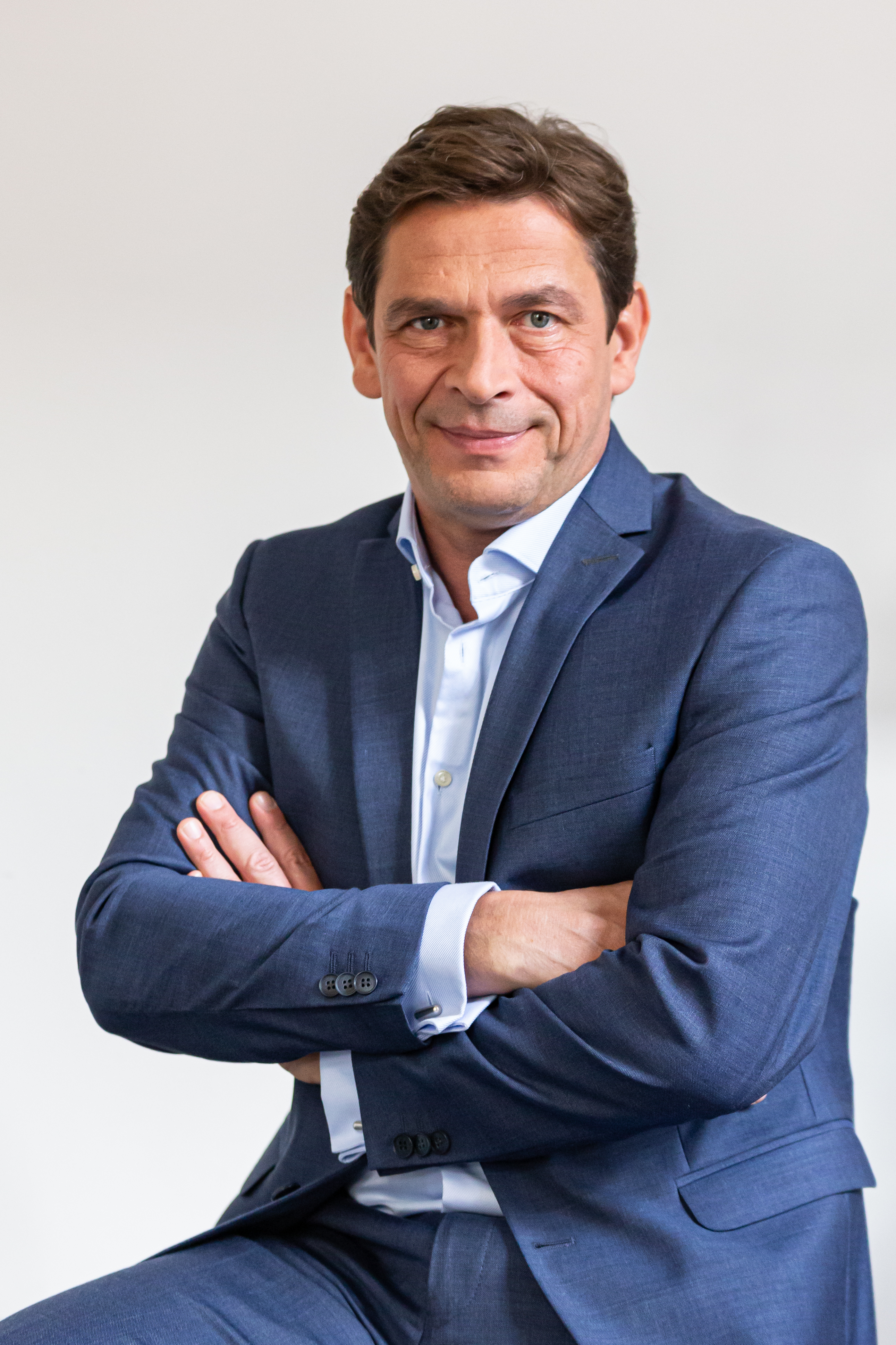 TV, ARD, Cast "Rote Rosen" Staffel 16; Tom Mikulla